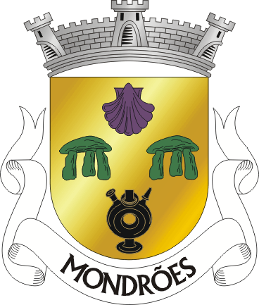 Brasão da freguesia de Mondrões (concelho de Vila Real)